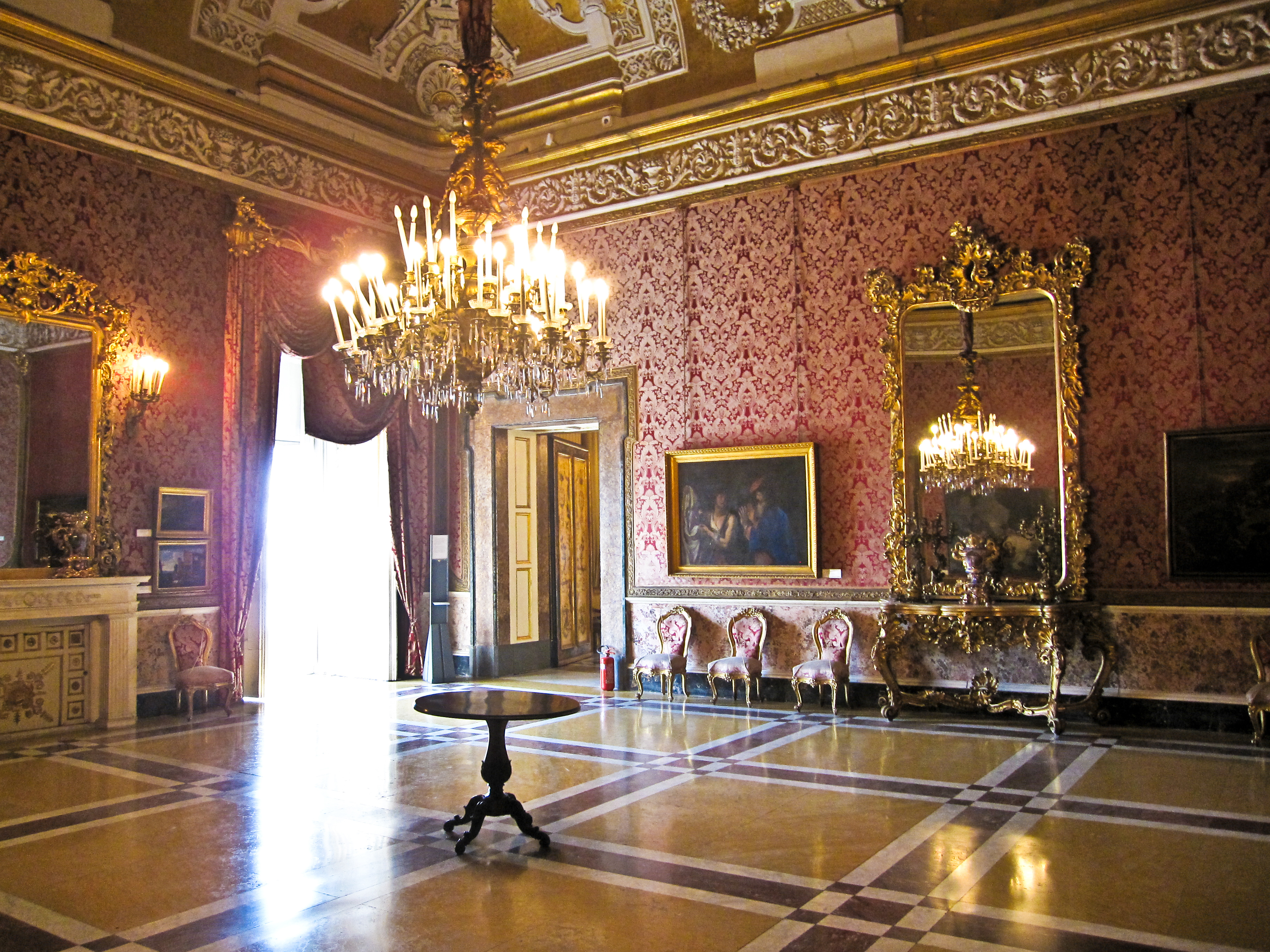 Appartamento storico